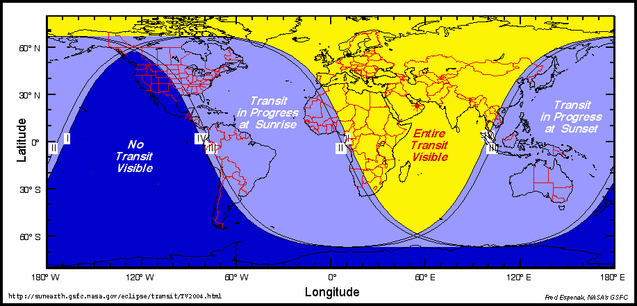 Kart som viser hvor venuspassasjen er synlig